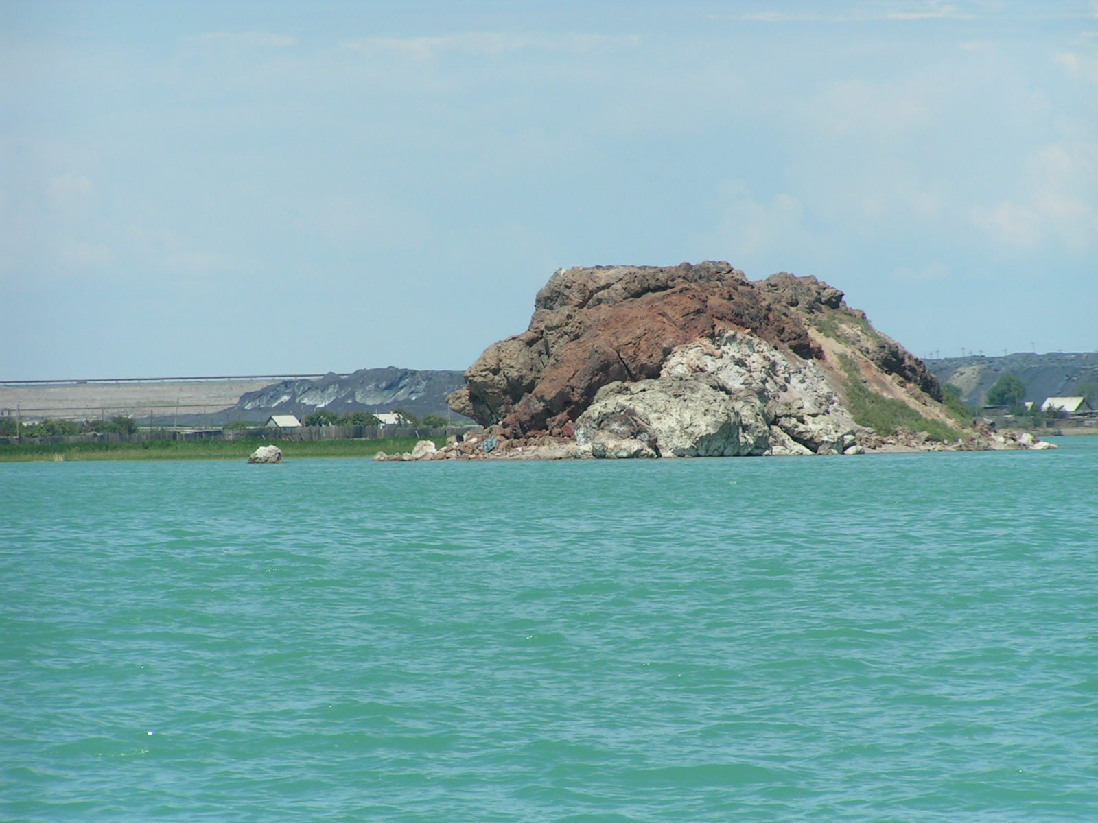 Zub. Balkhash